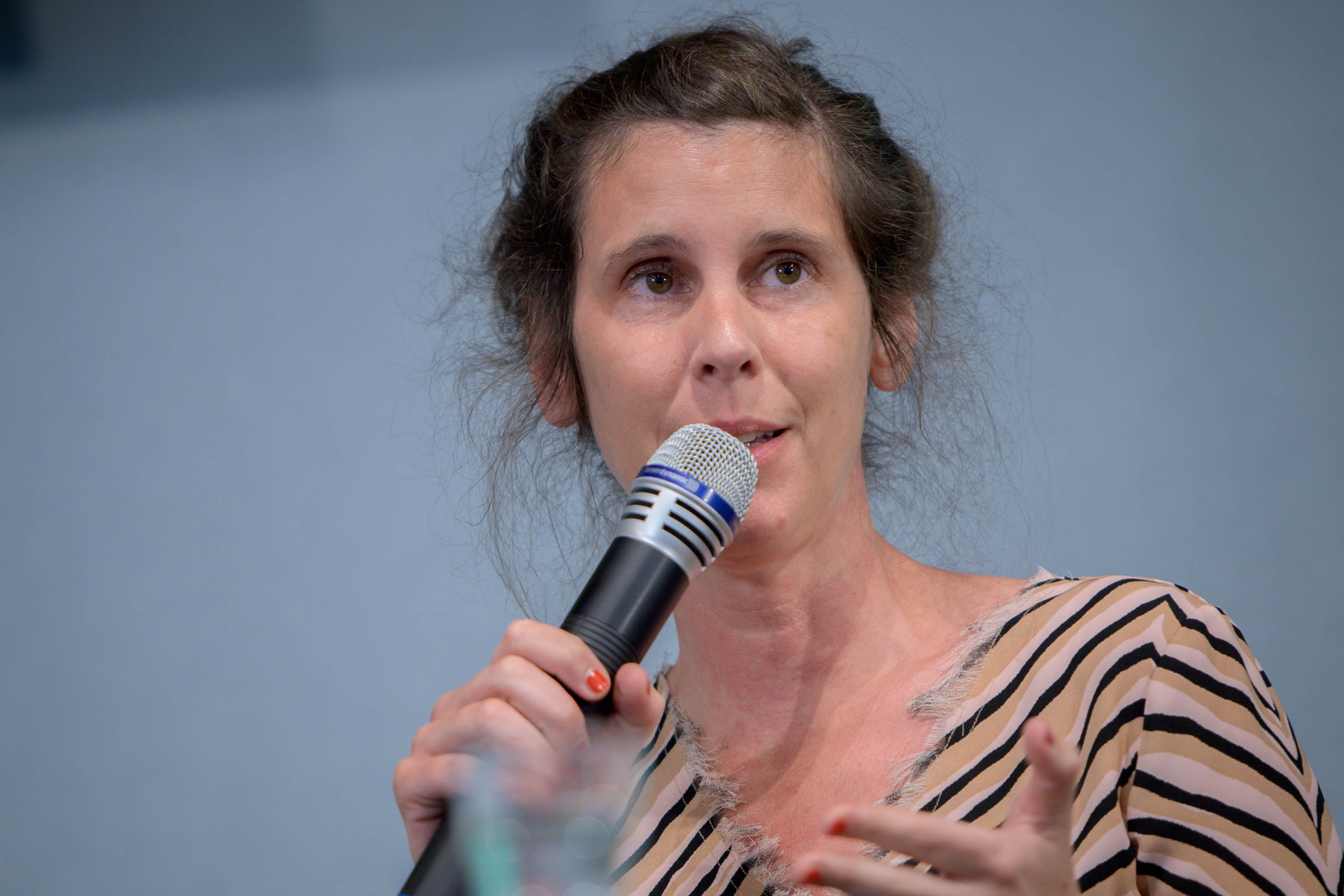 Daniela Dröscher auf einer Veranstaltung der Heinrich-Böll-Stiftung